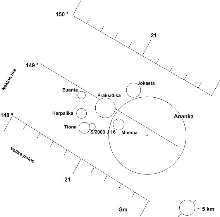 Na diagramu so prikazani položaji članic jedra Anankine skupine Jupitrovih lun v polarnih koordinatah: na eni osi je oddaljenost od Jupitra v Gm na drugi osi je naklon tirnice Vir podatkov Elementi tirnic: JPL (Avgust 2006). Velikost teles: Sheppard-ove strani (Avgust 2006) Izdelano z orodjem: Microsoft® Office Visio® Standard 2003.